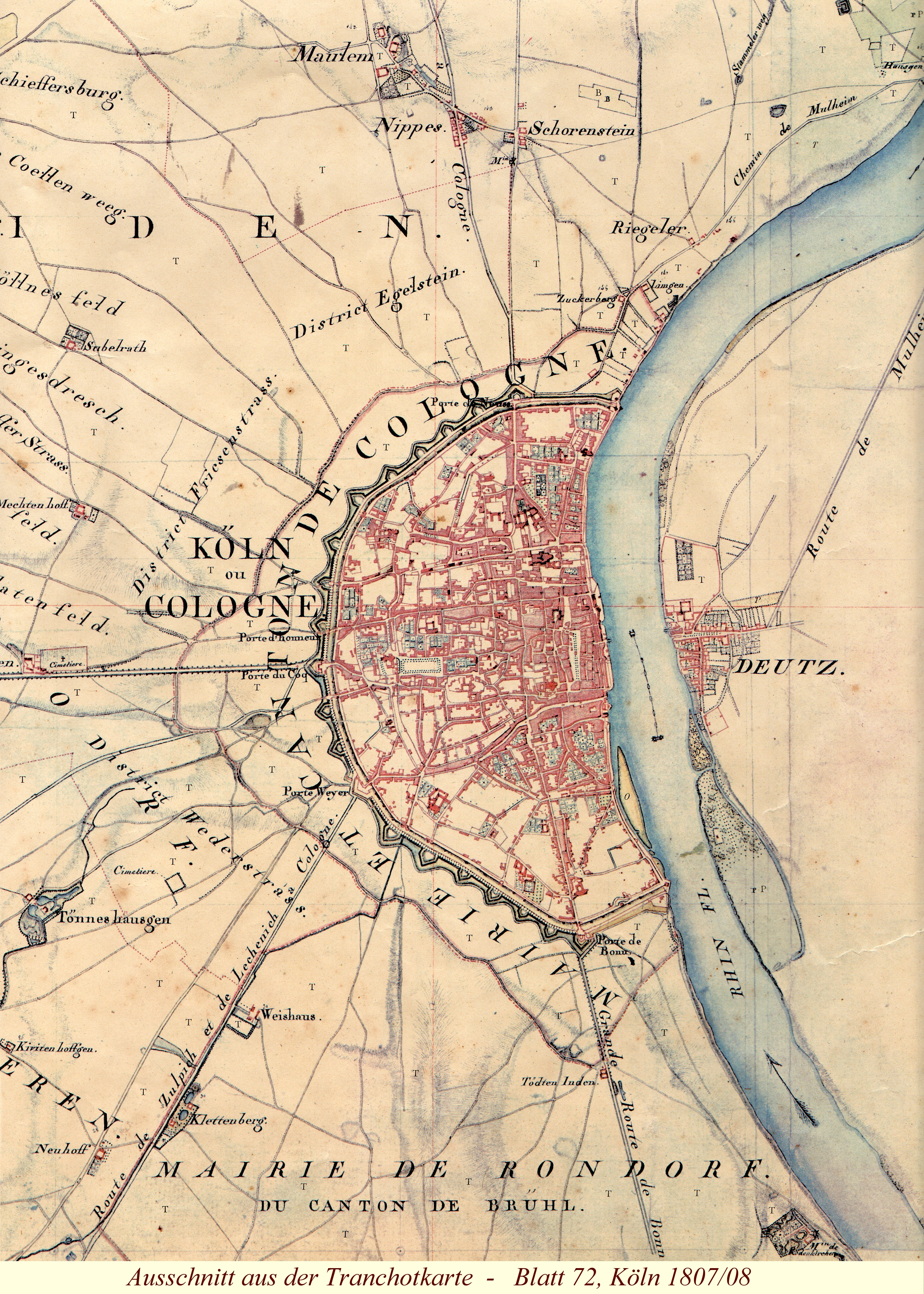 Kartenaufnahme der Rheinlande durch Oberst Tranchot und Generalmajor Freiherr von Müffling 1803-1820 Blatt 72, Köln (Cologne); hier Detailausschnitt